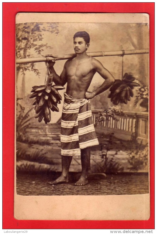 PHOTO ORIGINALE SUR CARTON DE TAHITI . JEUNE MAORI DIMENTIONS 13,5 X 10 cm. (PHOTOGRAPHE S . HOARE).